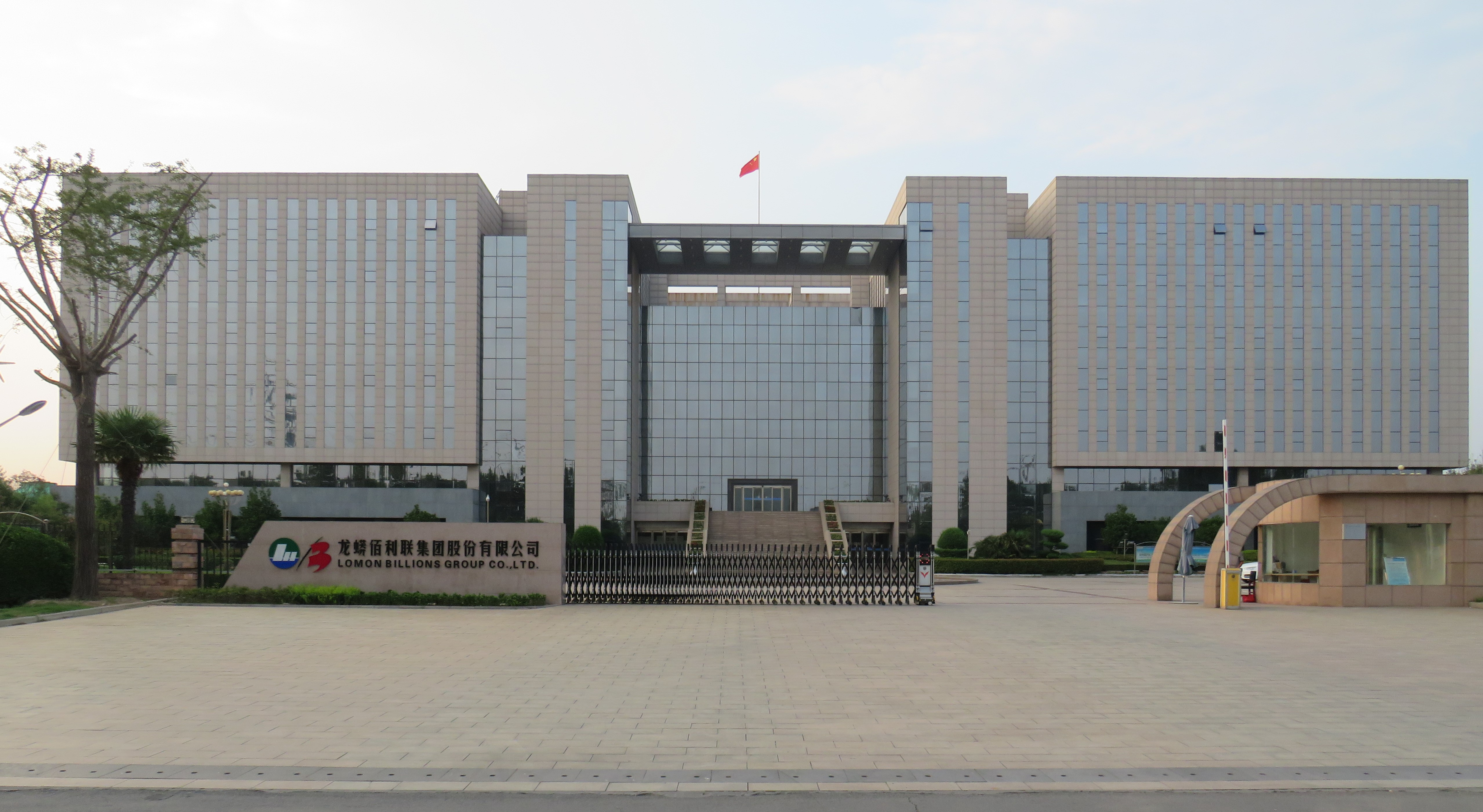 Haupttor der Firma in Jiaozuo